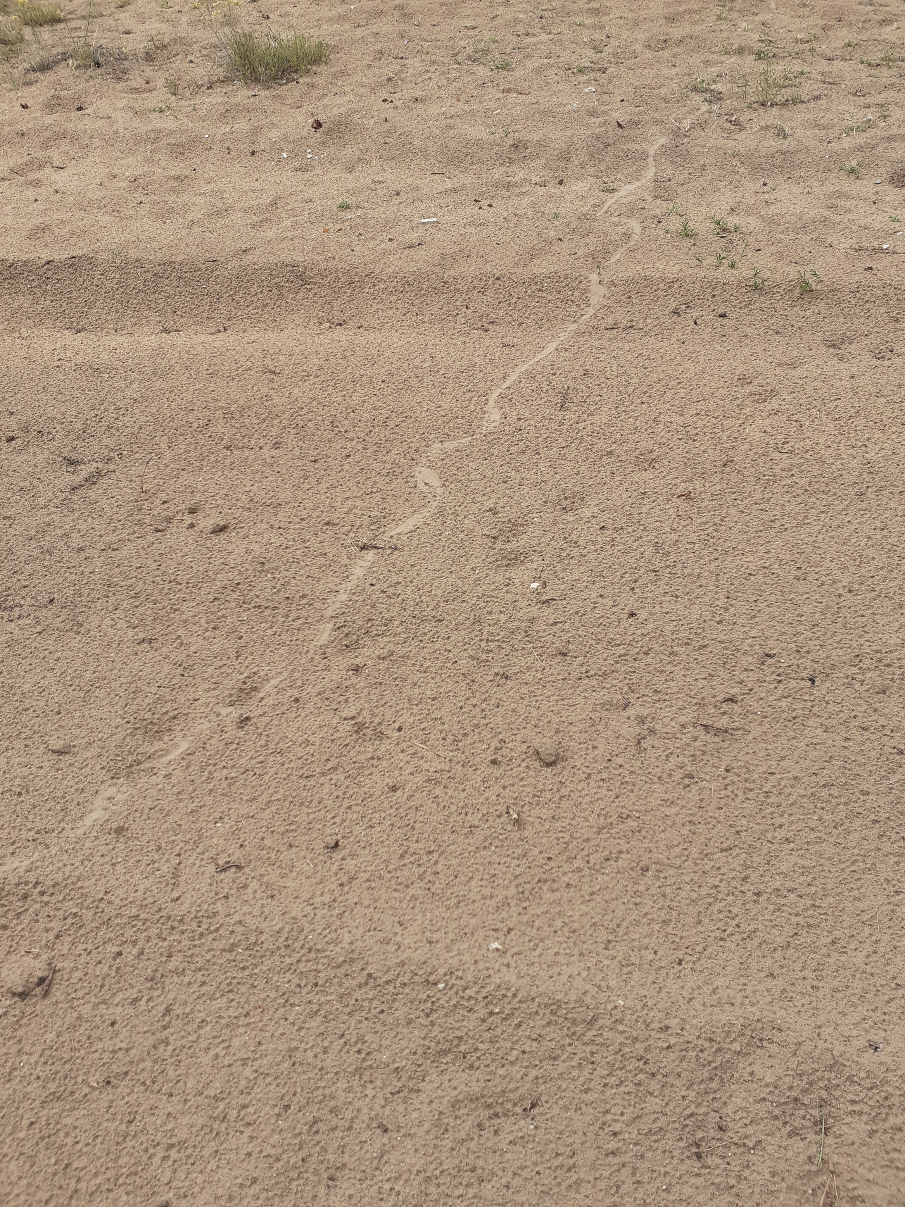 Знято мобілкою Самсунг у Сосновому лісі